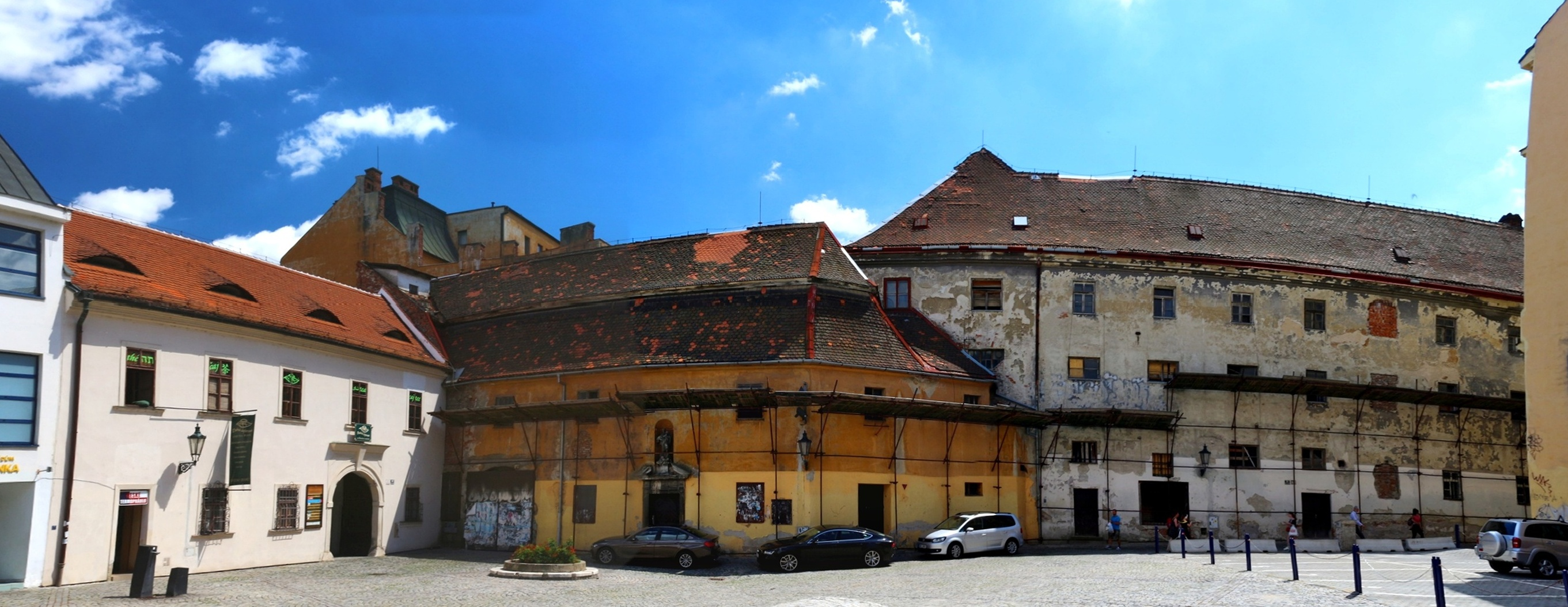 Františkánský klášter v Brně